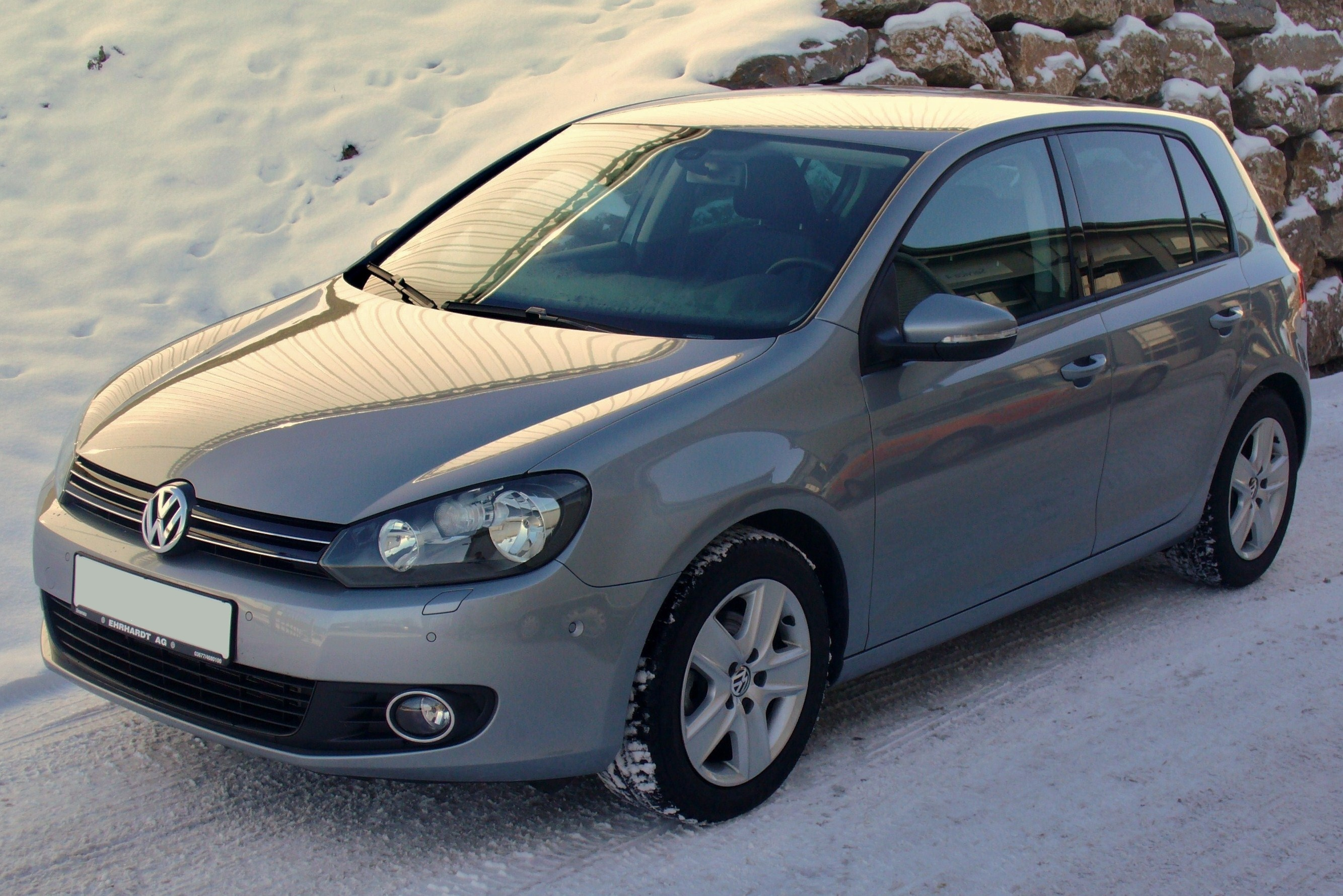 VW Golf VI